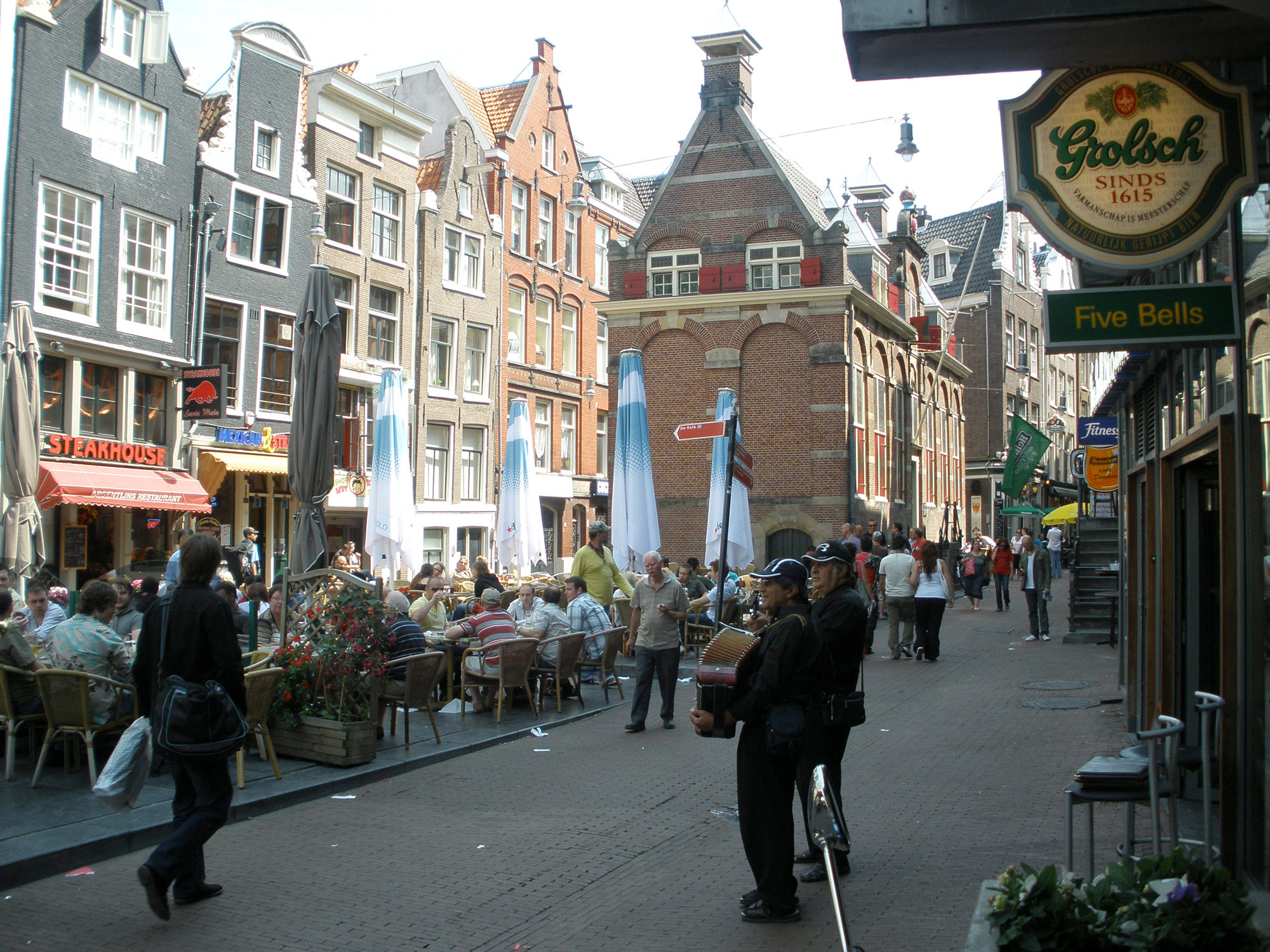 The Nieuwezijds Kolk square in Amsterdam